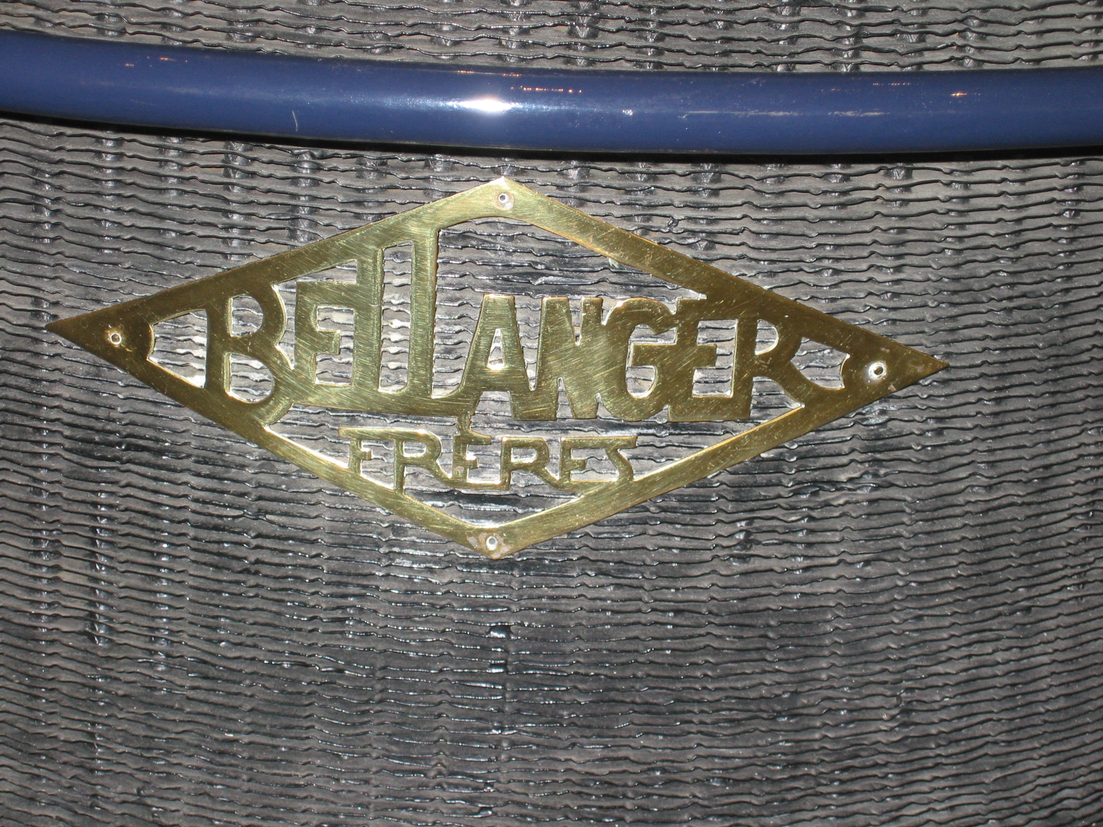 Emblem Bellanger 1921